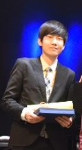 Fotografía del pianista coreano Wang Ha DONG durante la entrega del Primer Premio en la XXXV edición del Concurso Internacional de Piano Delia Steinberg celebrado en Madrid en 2016.